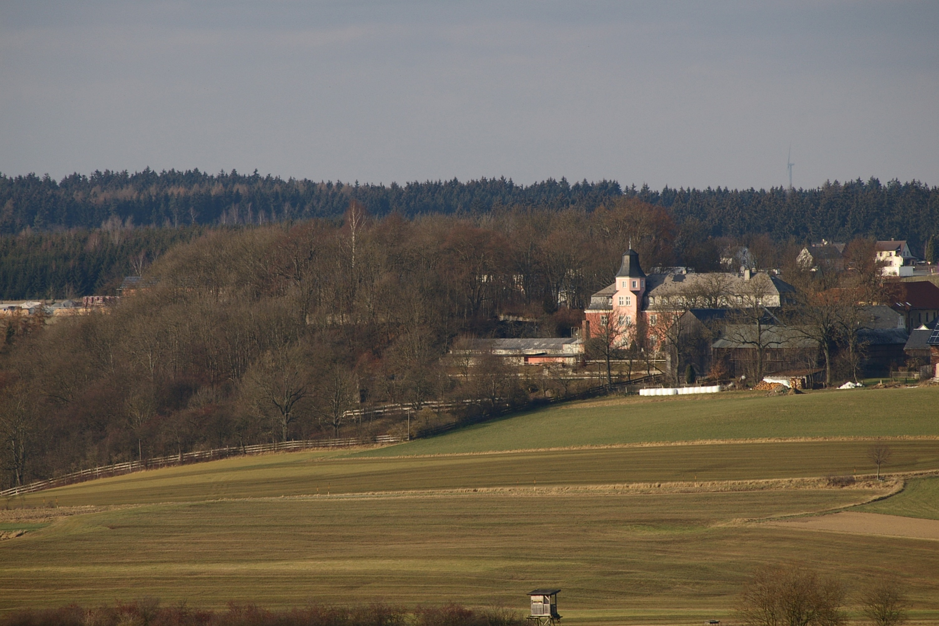 Schloß Gattendorf, Gemeinde Gattendorf, Landkreis Hof, Ansicht von Süden